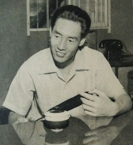 清水宏員